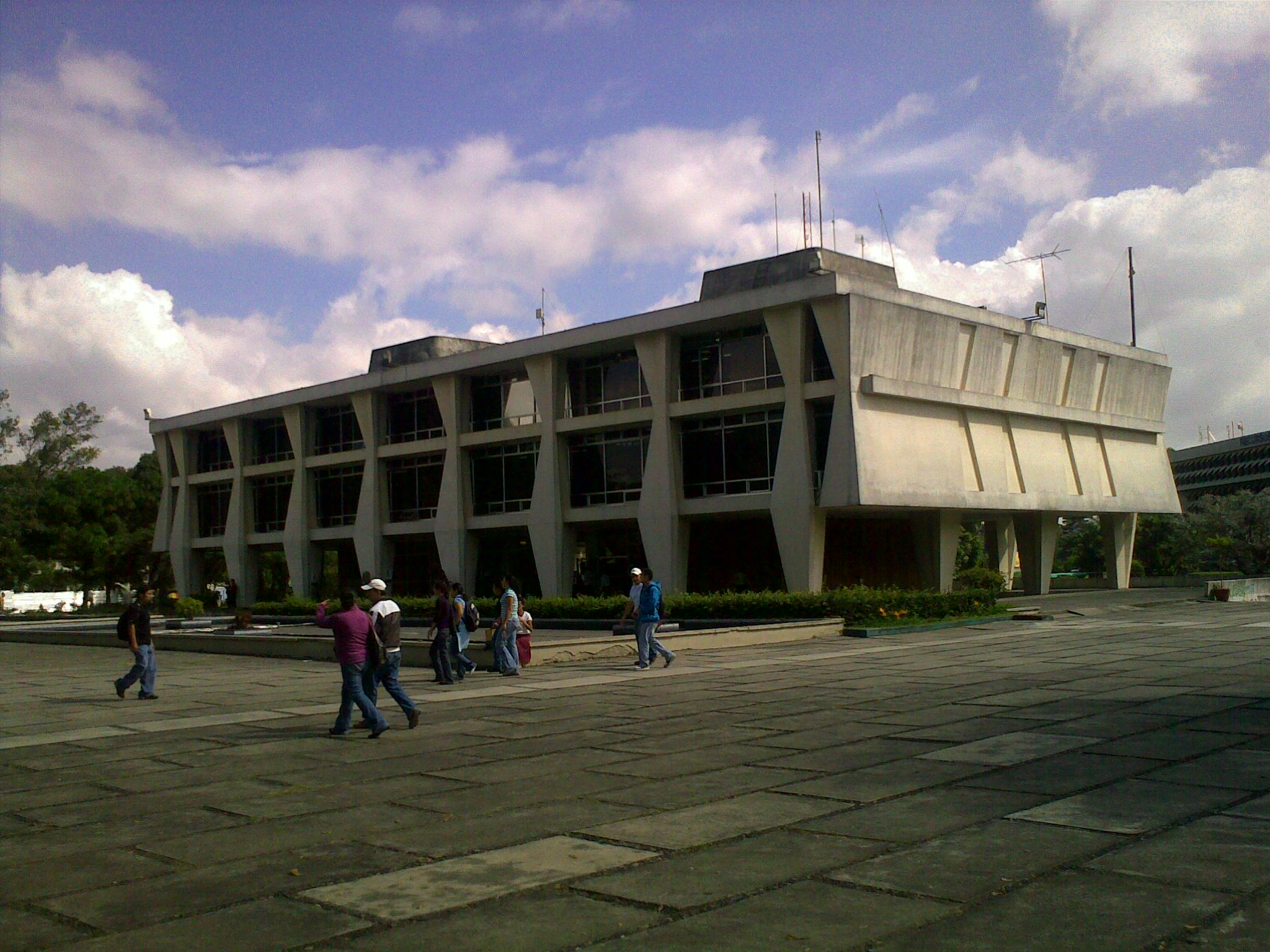 Edificio de la Rectoria en la Universidad de San Carlos de Guatemala